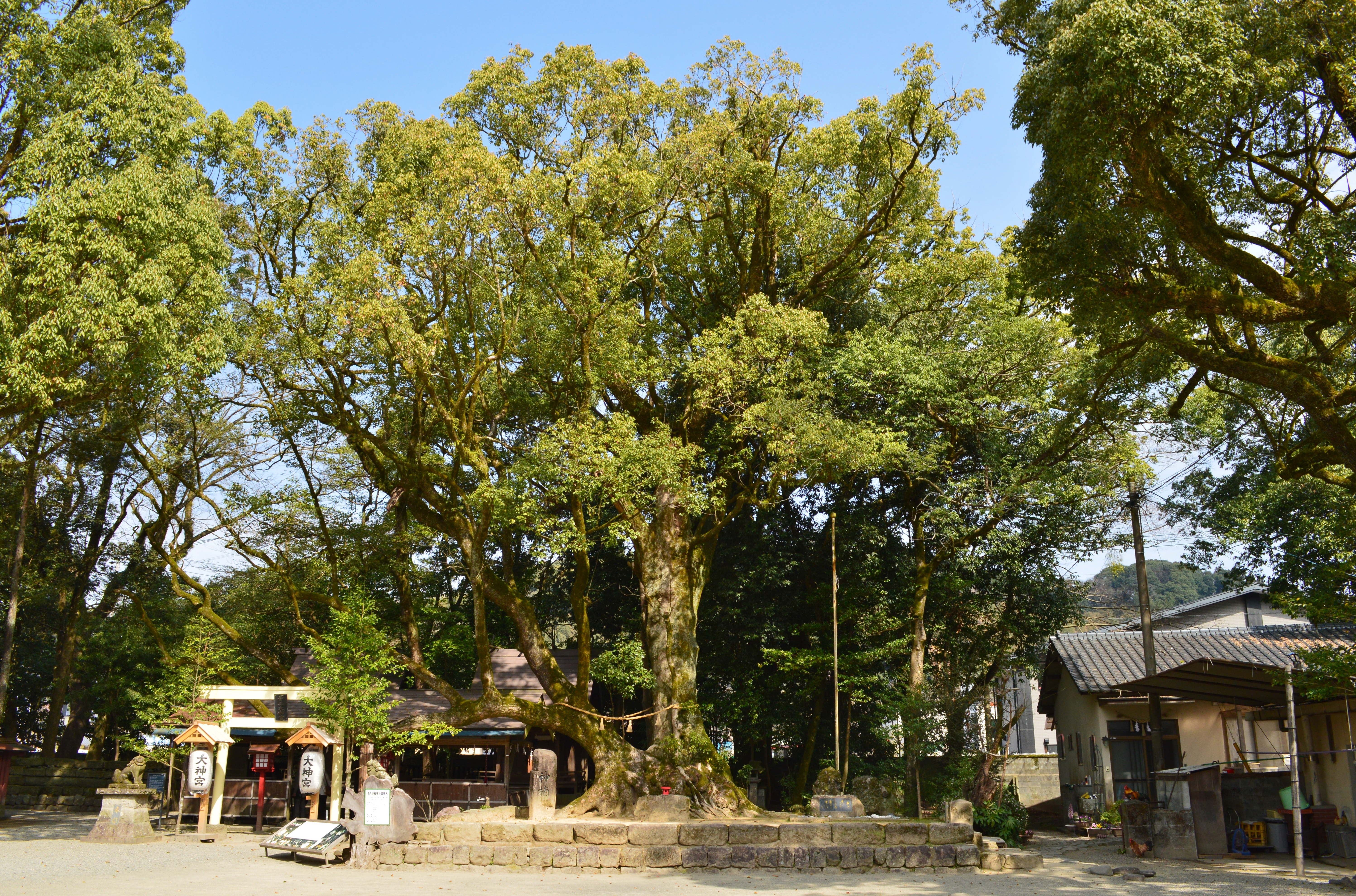 青井阿蘇神社 クスノキ